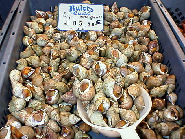 Gekookte wulken (bulots)